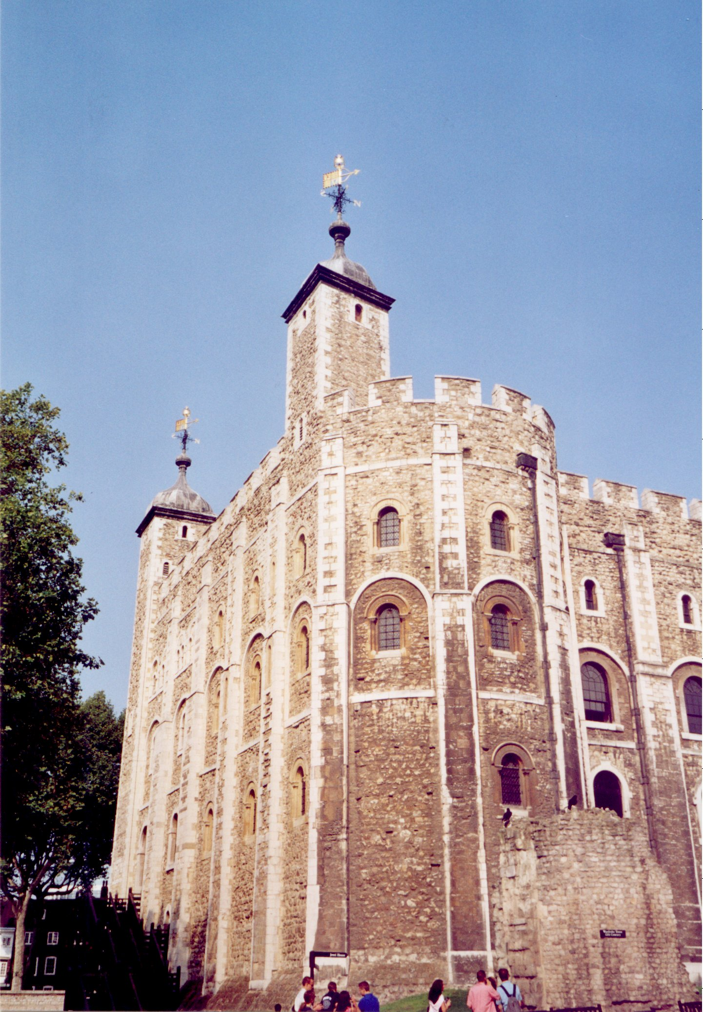 Der White Tower des Tower von London, 1078 von Wilhelm dem Eroberer errichtet.